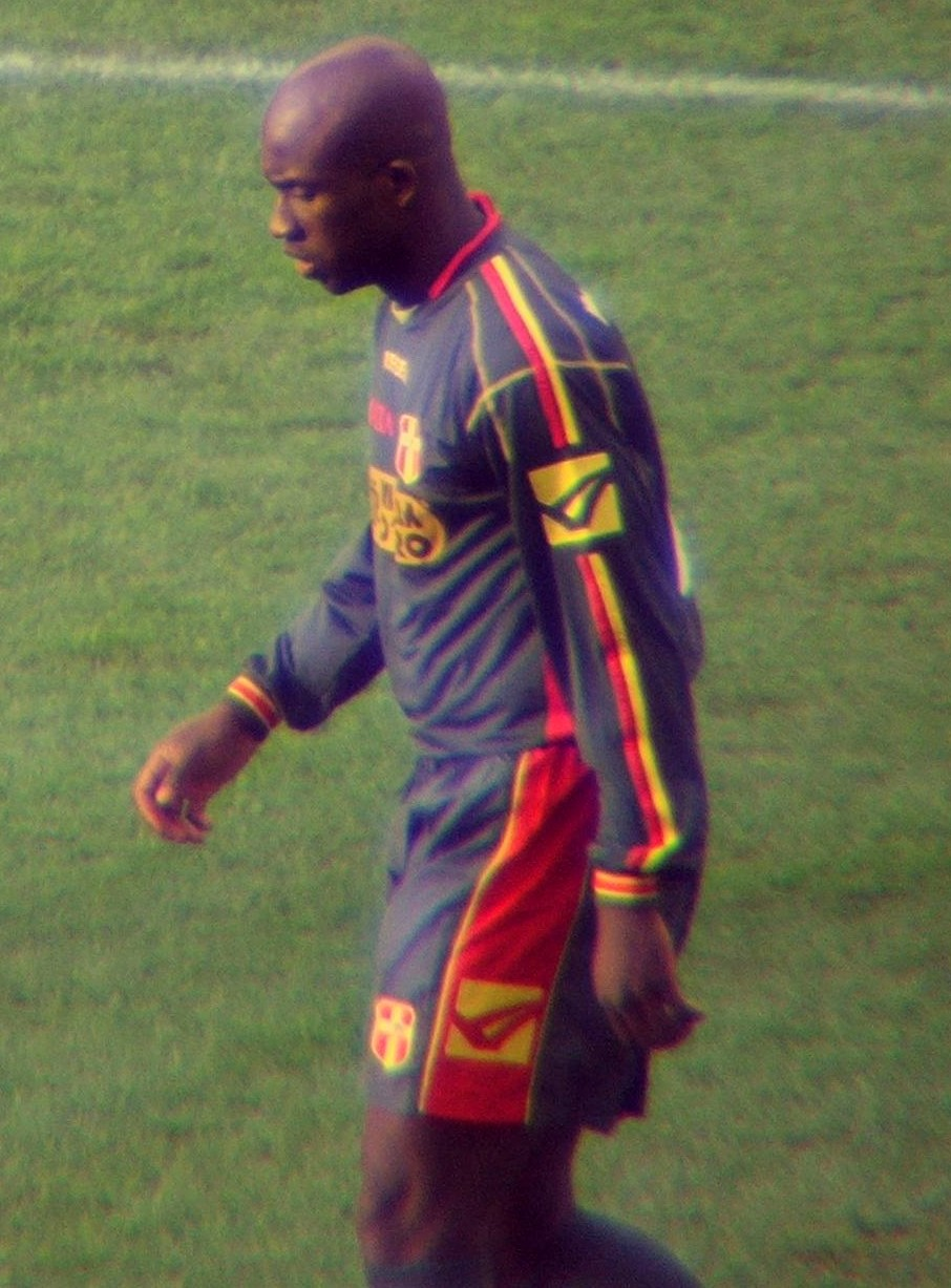 Zorò in Messina-Inter campionato 2005-2006 27-11-2005